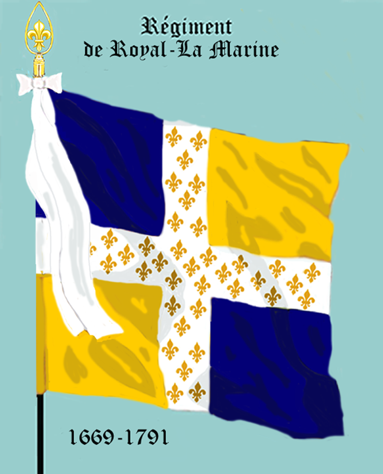 Ordonnanzfahne eines königlich französischen Infanterie-Regiments. - Entnommen und überarbeitet aus: „LES UNIFORMES ET LES DRAPEAUX DE L'ARMÉE DU ROI“ Marseille 1899. (Drapeau d'Ordonnance d' un régiment française d'infanterie royale.)